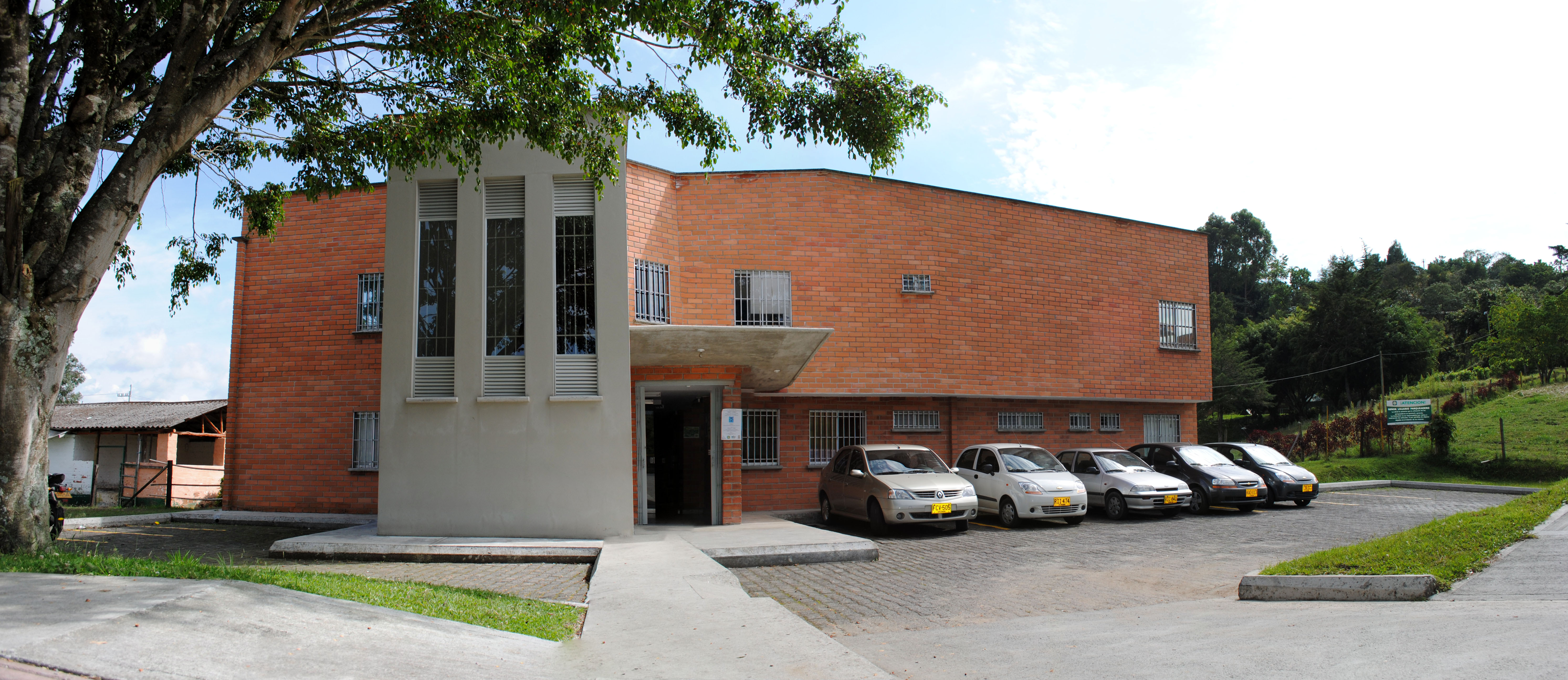 Consultorio Jurídico